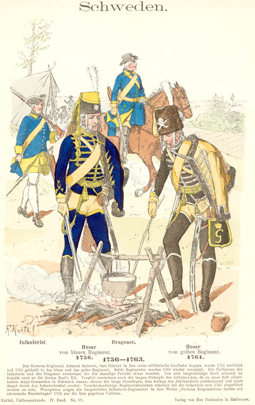 Иллюстрация Рихарда Кнотеля